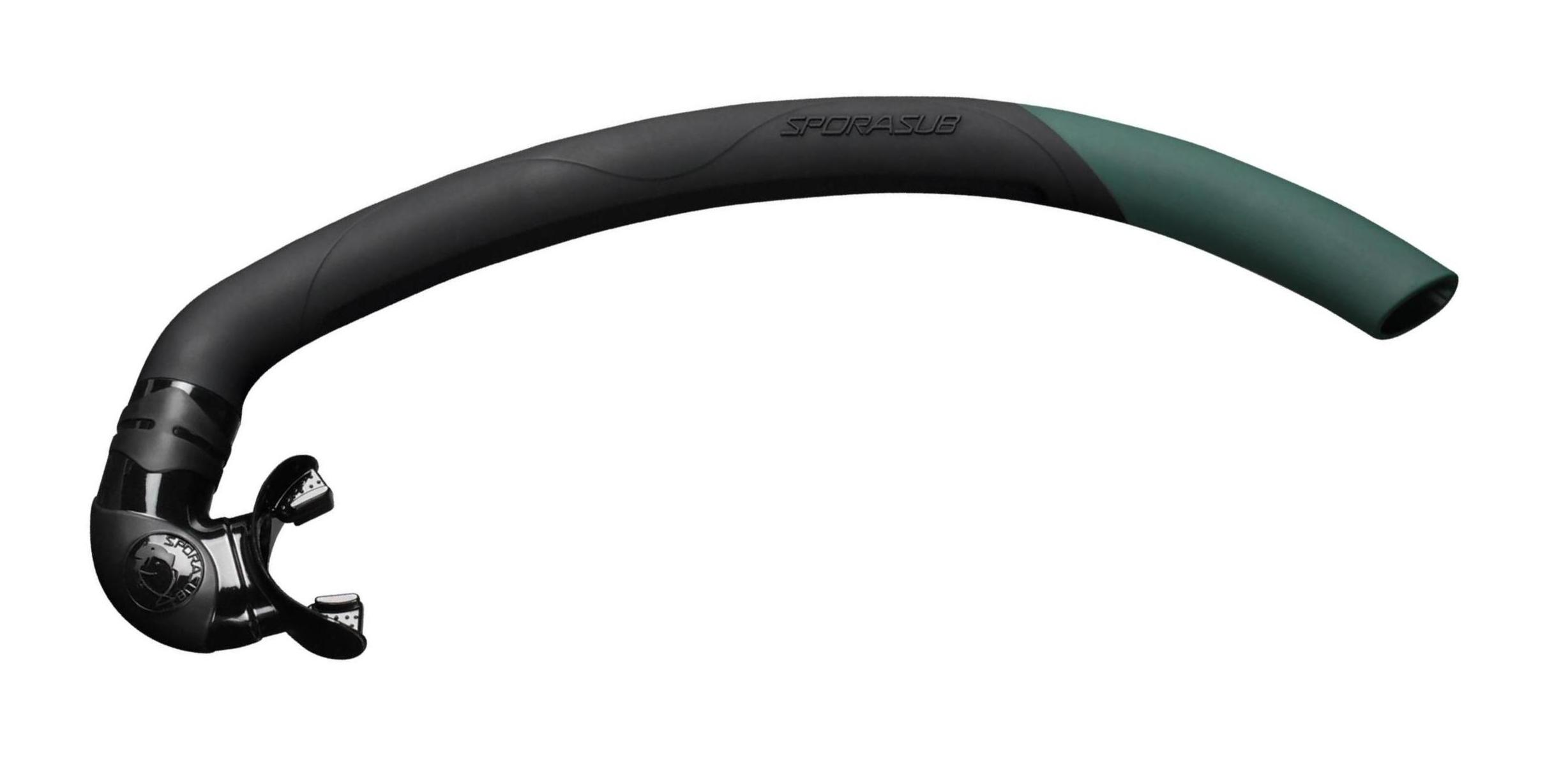 Дыхательная трубка для фридайвинга